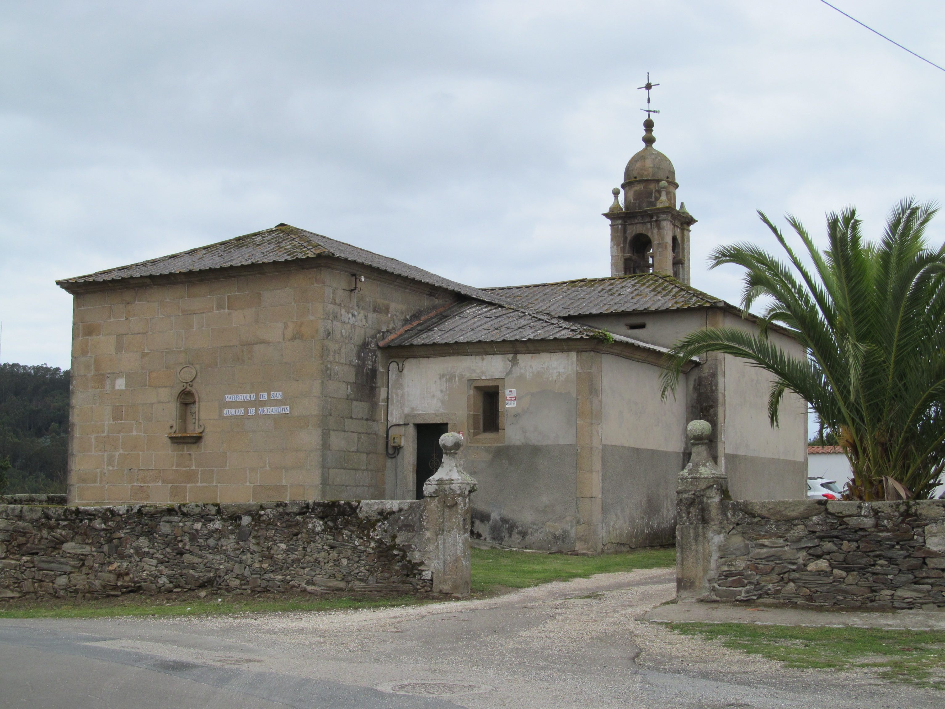 Mugardos - Capilla de San Julián en el lugar de O Baño, de estilo románico tardío, con planta de cruz latina.